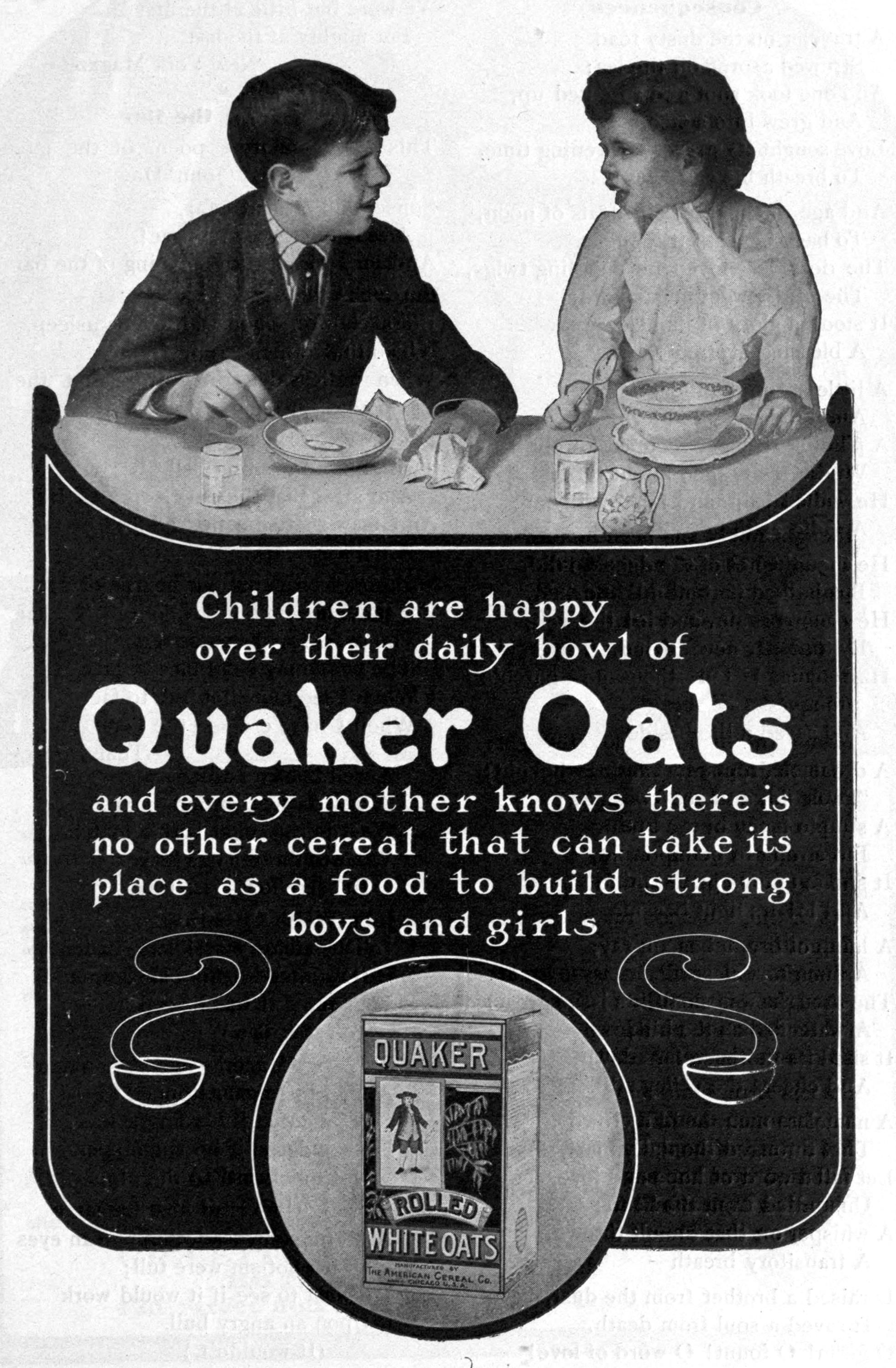 1905 Quaker Oats magazine advertisement